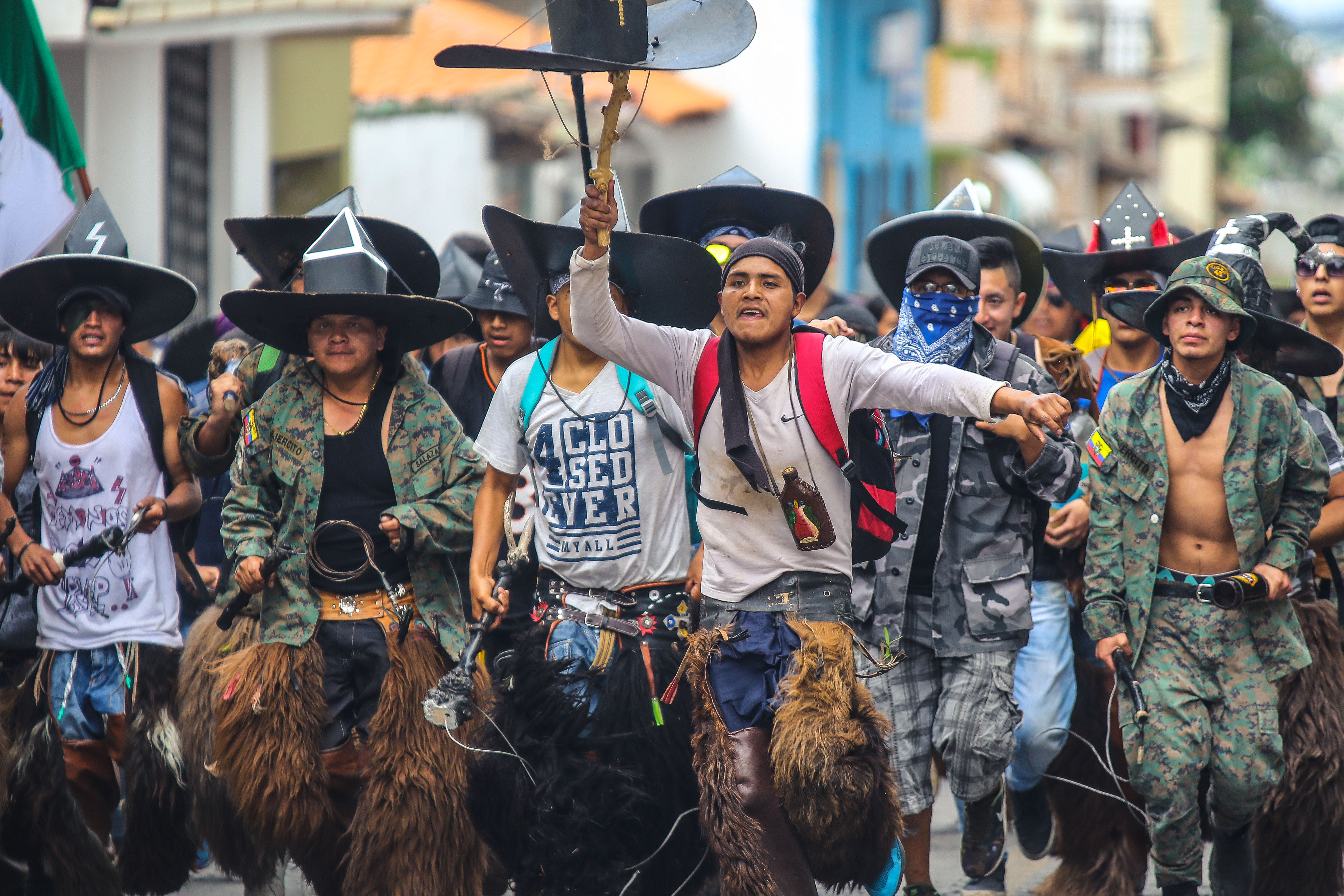 Cotacachi, Imbabura 24 Jun (Andes).- La toma de la plaza central en Cotacachi es una tradición en las fiestas del Inti Raymi, varias comunidades se juntan a bailar y disfrutar de la fiesta del sol. Fotografías: Carlos Rodríguez/Andes.